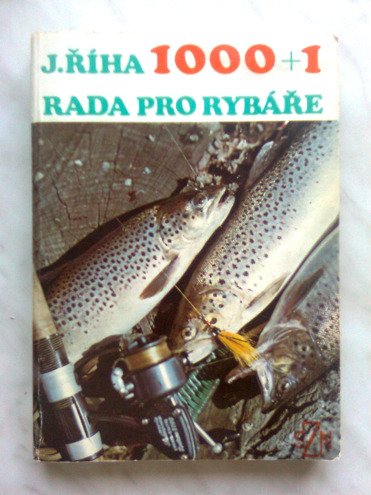 Autor fotografie Jiří Zelenka. Rybářské potřeby v roce 1980 - 1990 v ČSSR. A porovnání dnes.